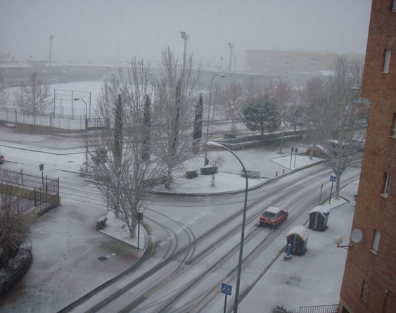 Polideportivo de La Chana, esquina calle Virgen de la Consolación con c/ Antonia Mercé, en el barrio Angustias-Chana-Encinas (Distrito Chana, ciudad de Granada, España).